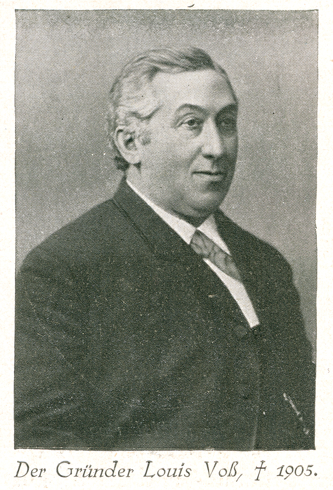 Der 1905 verstorbene Louis Voß (auch: Louis Voss), der 1867 in Hannover in der - damaligen - Burgstraße 9 auf der Höhe des heutigen Ballhofplatzes seinen Papierwarengeschäft eröffnete und durch die von ihm selbst hergestellten Schreibhefte für Schüler eine bekannte Persönlichkeit der Stadt geworden war. Sein Sohn Ludwig baute das bald Papiervoss genannte Unternehmen zu einem international tätigen Akteur aus, der auch im Ausland führend mit den Schulschreibheften wurde ...